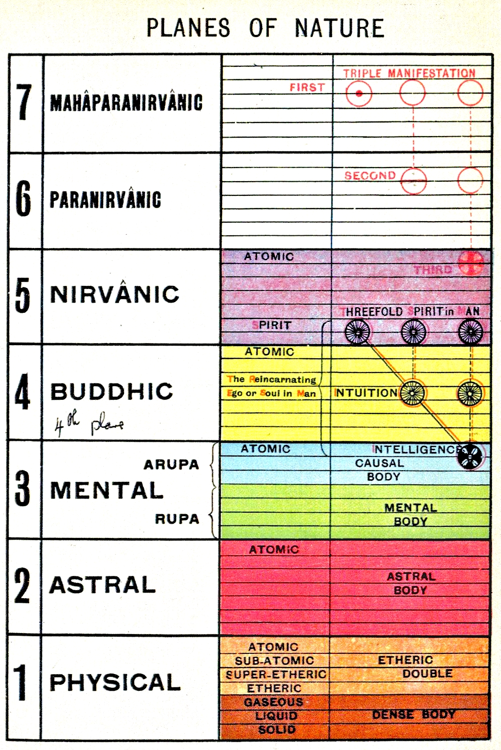 Die Pläne (feinstoffliche Welten oder Ebenen) der Natur Physischer Plan Astralplan Mentalplan Buddhischer Plan Atmischer Plan Paranirvanischer Plan Mahaparanirvanischer Plan